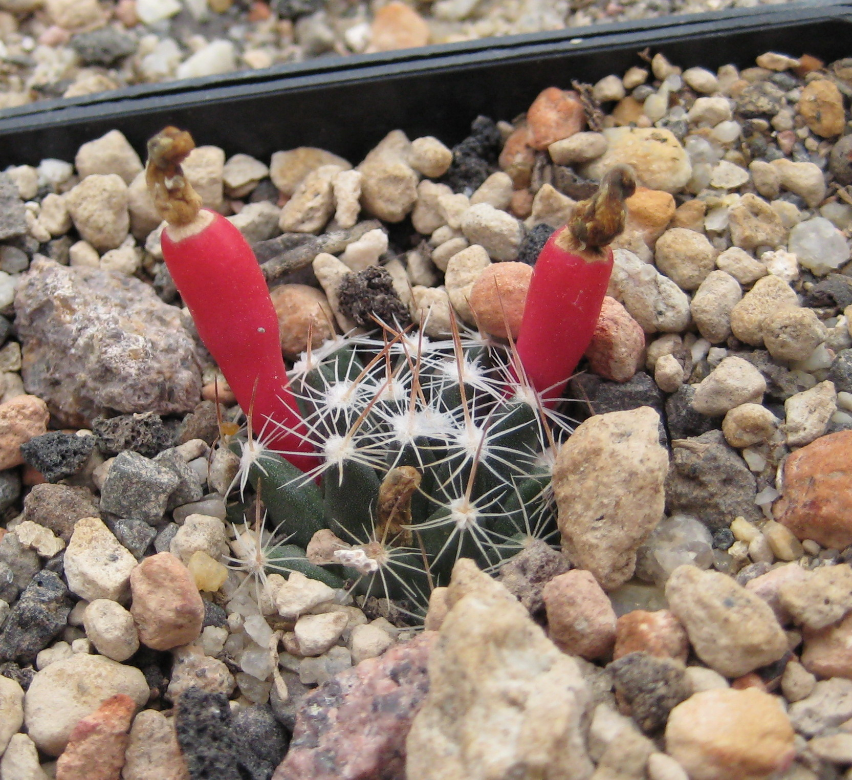 Mammillaria coahuilensis in Kultur